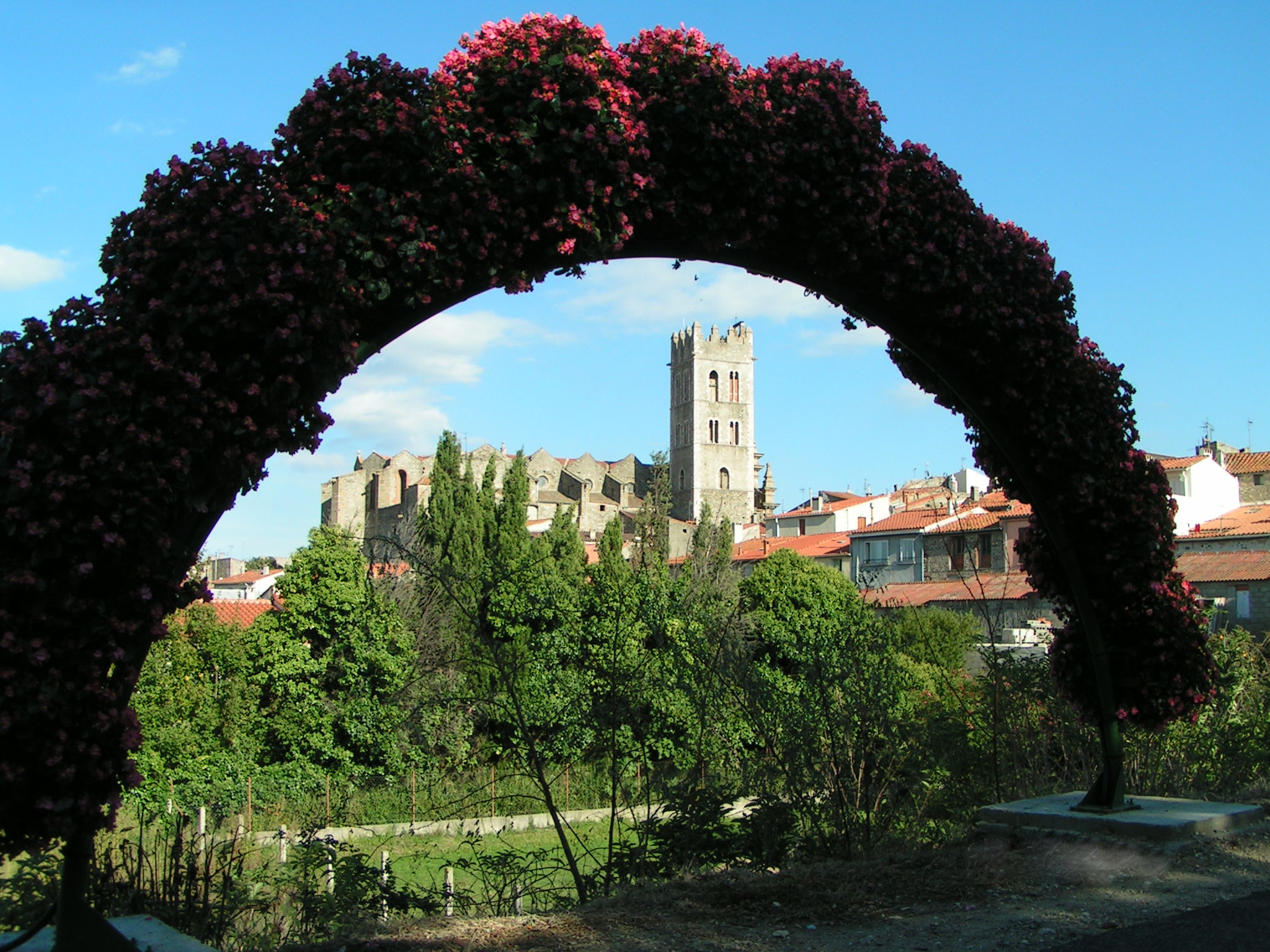 Ille-sur-Têt